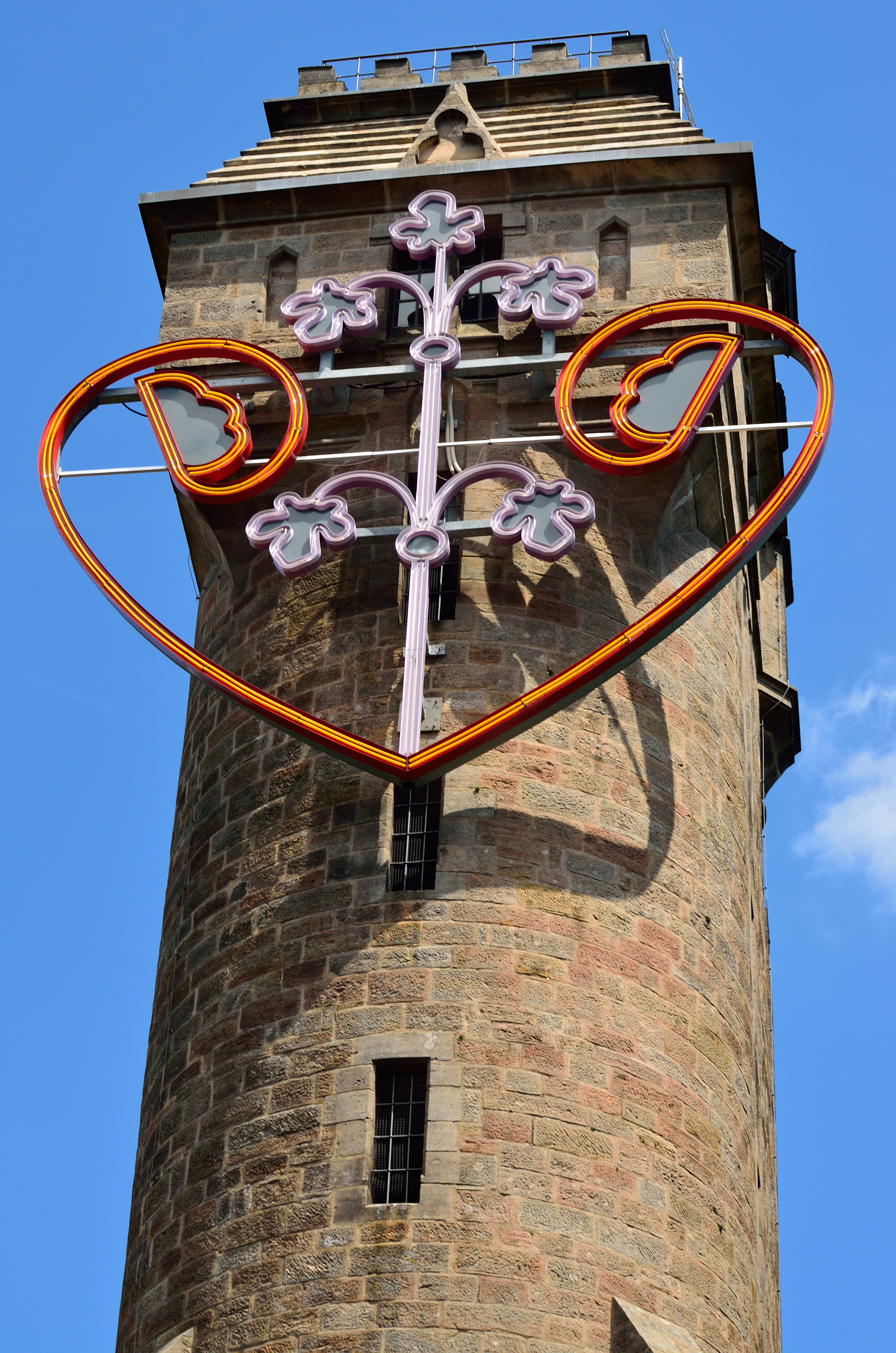 Lichtinstallation am Spiegelslustturm auf den Marburger Lahnbergen, von der Marburger Künstlerin Helmi Ohlhagen, angebracht 2006